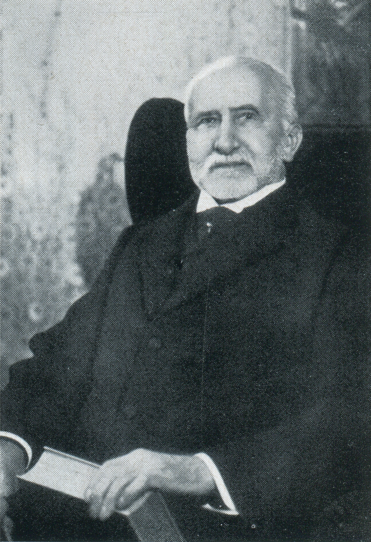 Rasterdruck einer Fotografie eines mutmaßlich Anfang der 1910er Jahre geschaffenen Gemäldes des Kaufmanns, Kolonialwaren-Großhändlers und Kaffeerösters „Ernst Grote (1845–1927)“ Gründer der Kaffeemarke Ernst Grote Kaffee ...